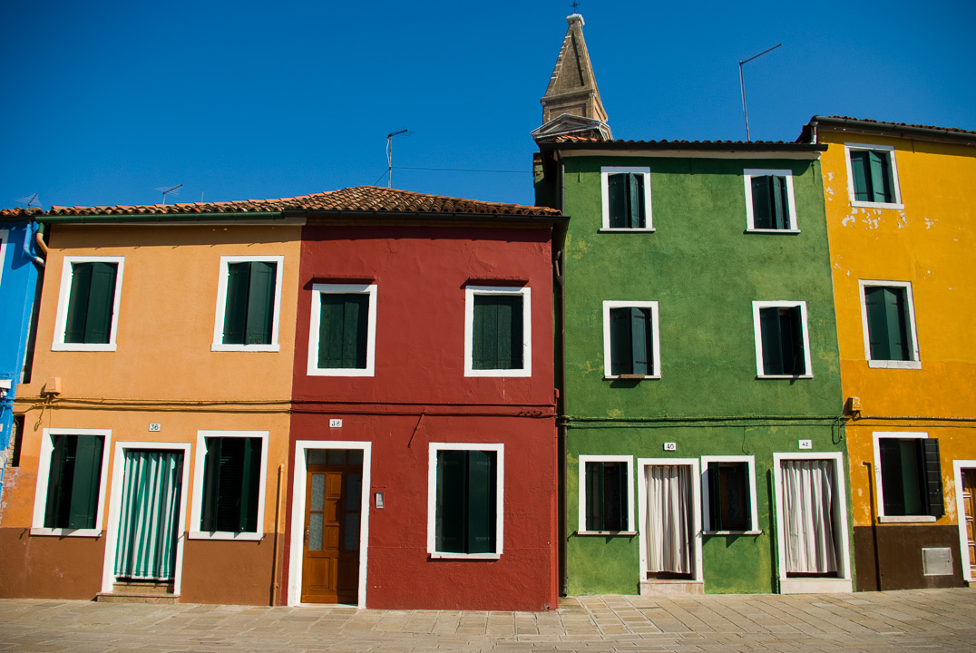 Quatre maisons à Burano